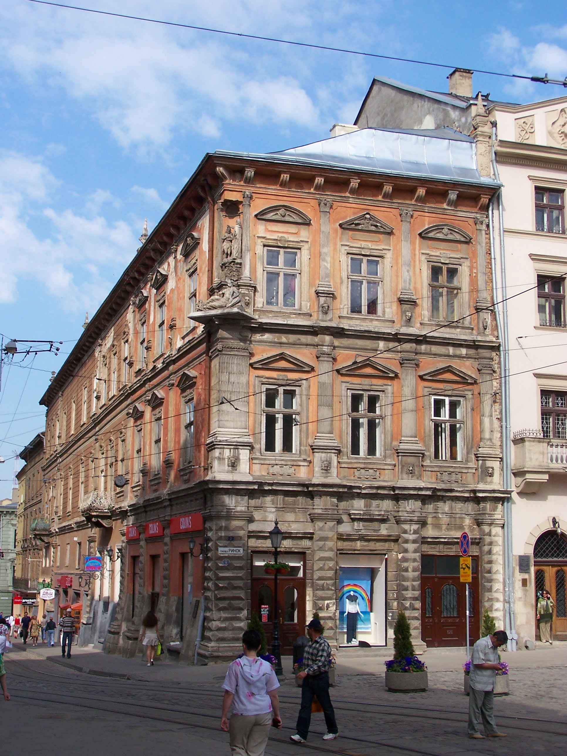 Kamienica Szolc-Wolfowiczów przy rynku we Lwowie (Ukraina).